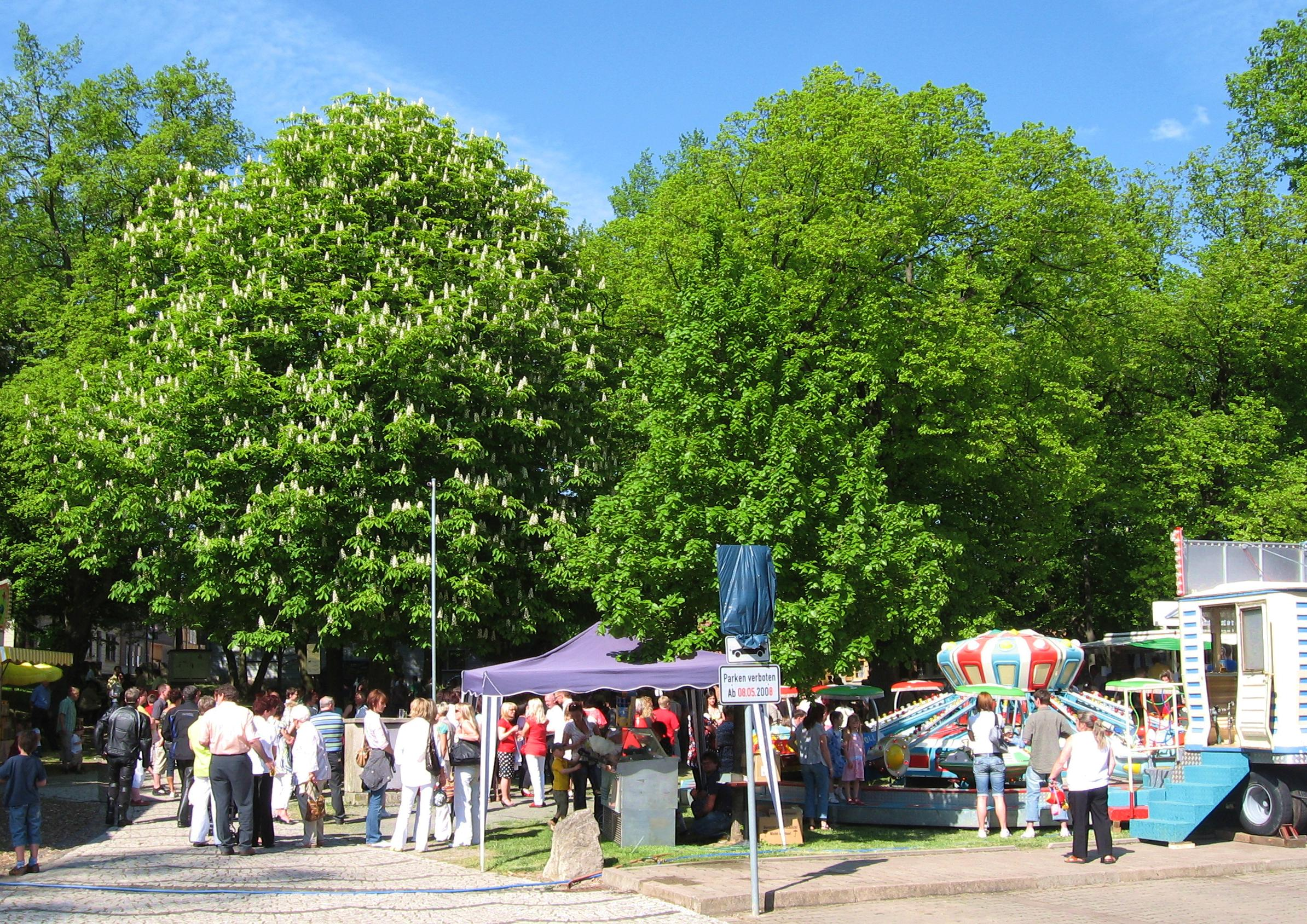 Der Dorfplatz von Oberdorla an Pfingsten 2008.